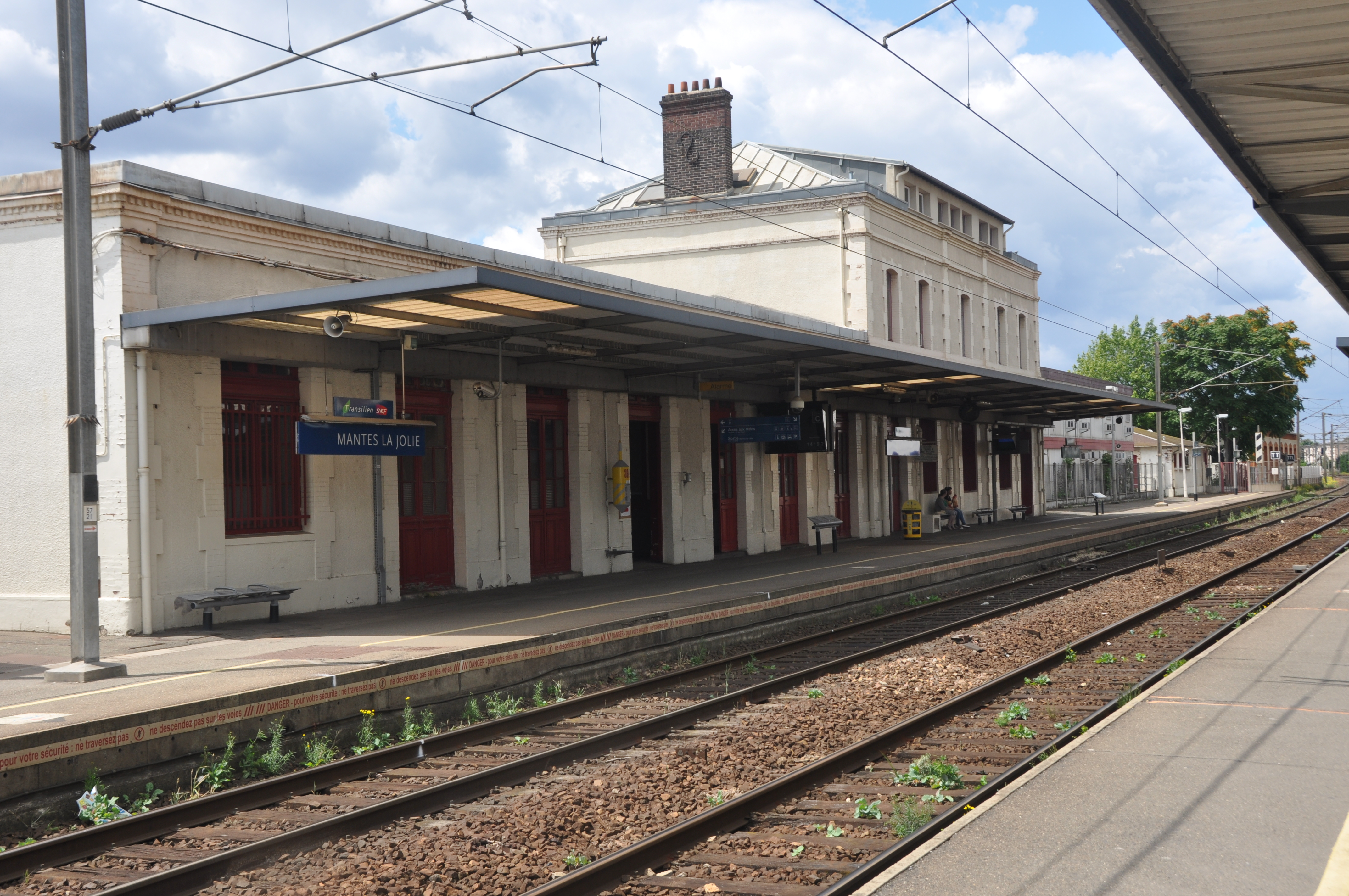 Vue du bâtiment voyageur de la gare de Mantes-la-Jolie depuis la voie numéro 3.